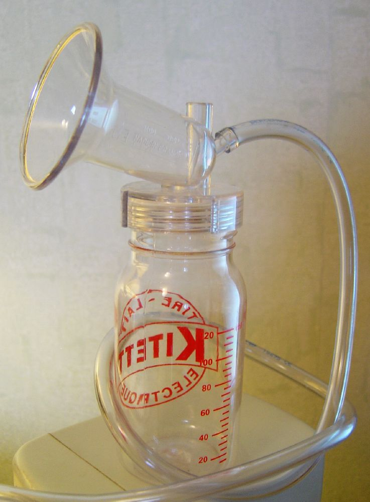 Tire-lait : embout, réservoir et flexible.